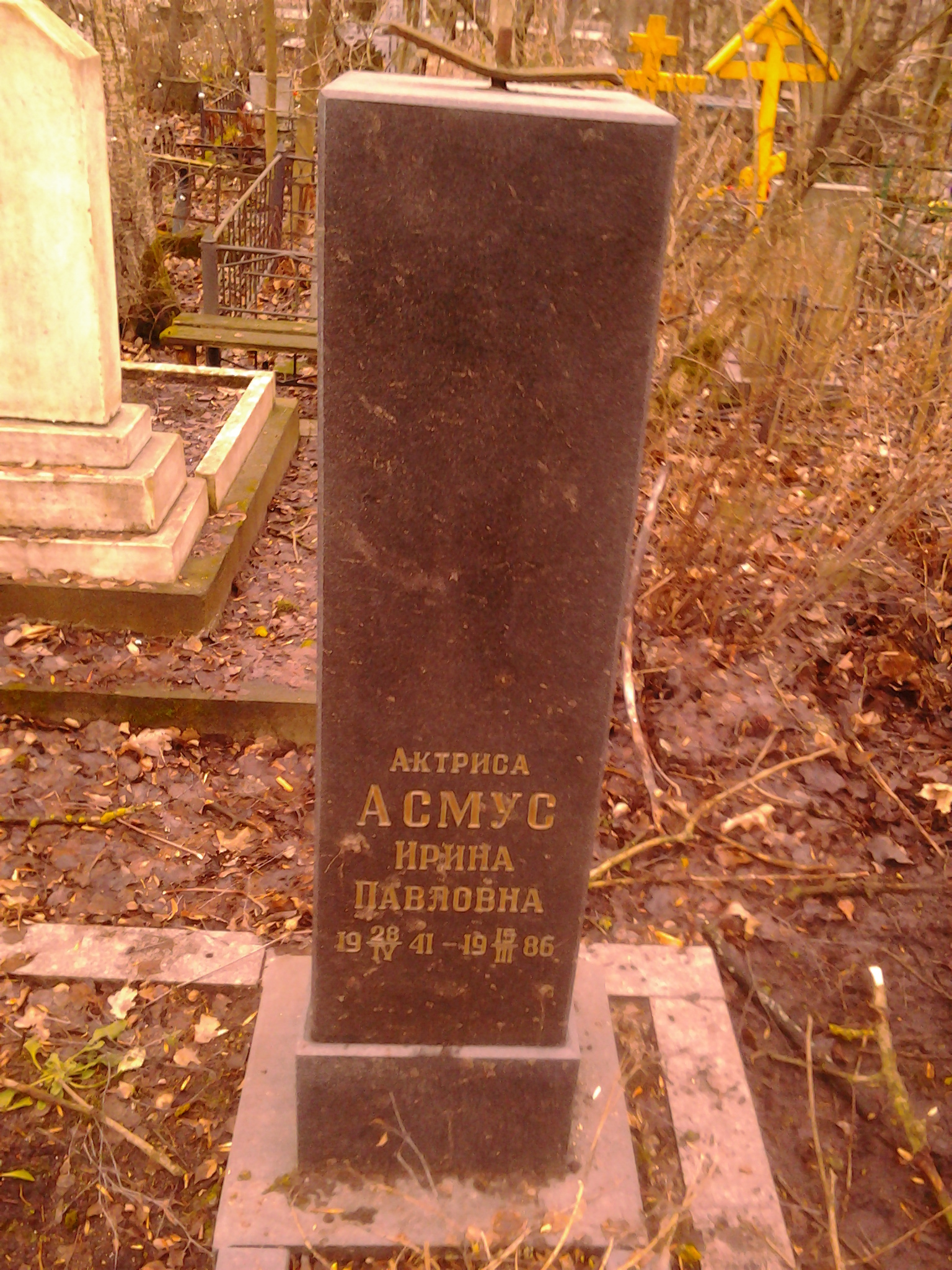 Надгробный памятник И. П. Асмус на Большеохтинском кладбище Санкт-Петербурга.